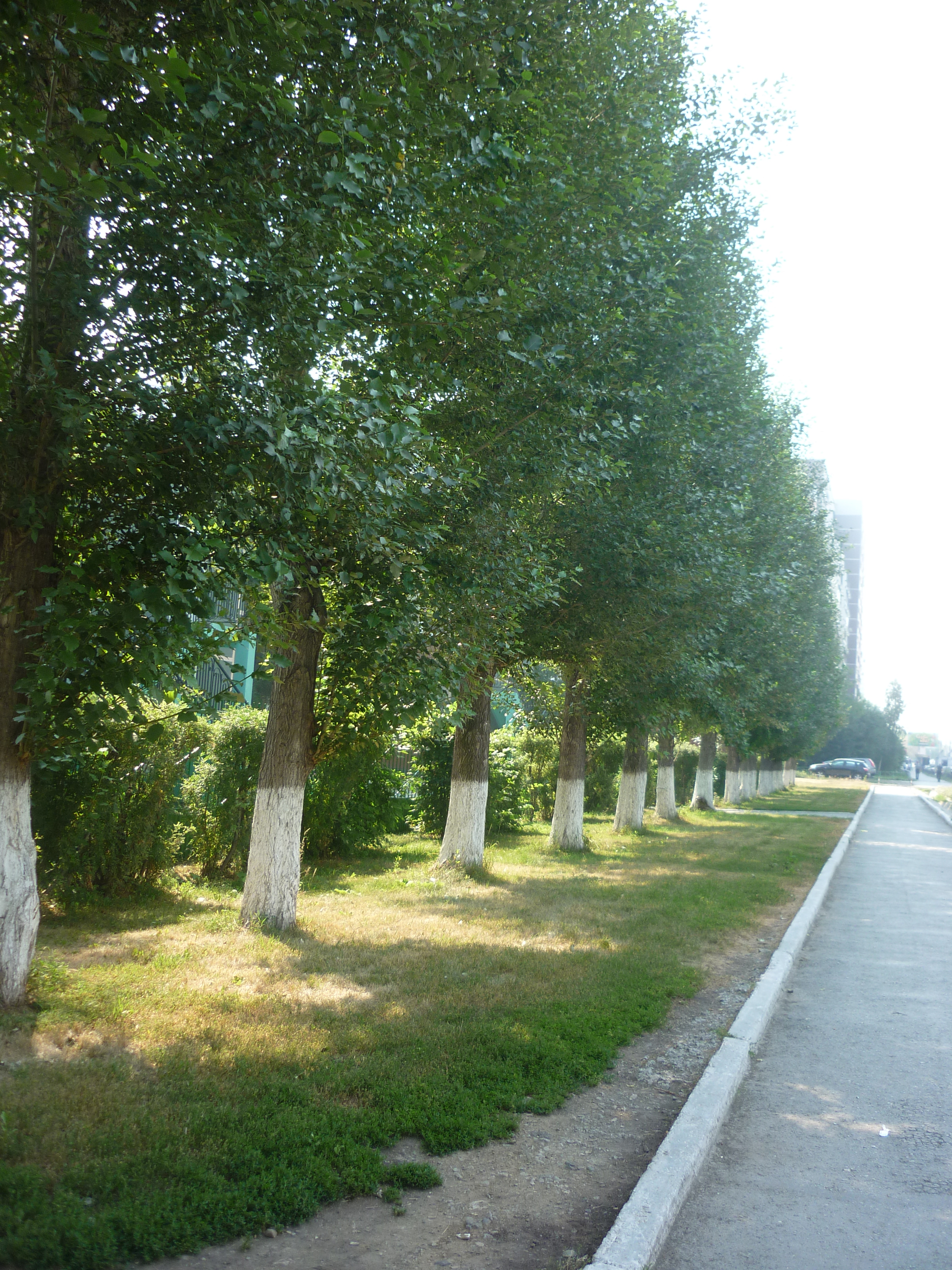 Аллея у детского сада 43 по улице Серова